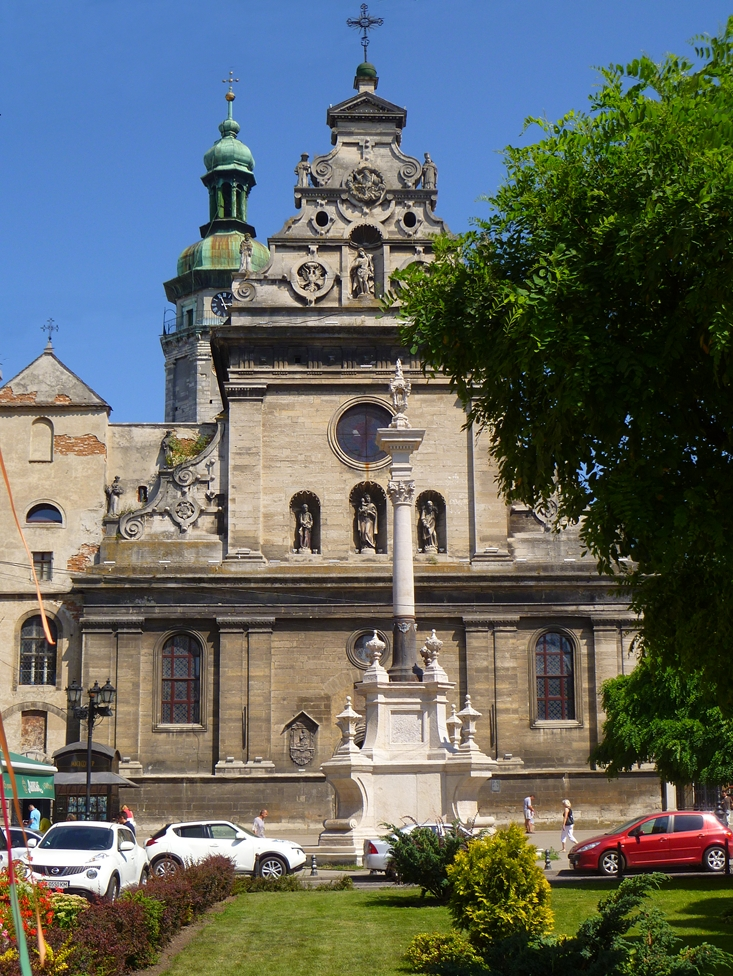 Церква св.Андрія